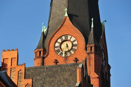 Kirchturmuhr der Pfingstkirche Berlin Friedrichshain